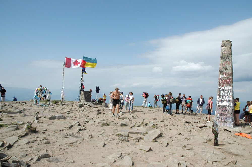 Hoverla